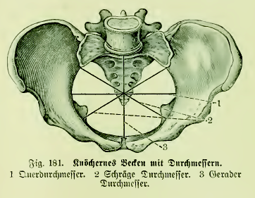 Fig. 181. Knöchernes Becken mit Durchmessern. 1 Querdurchmesser. 2 Schräge Durchmesser. 3 Gerader Durchmesser.